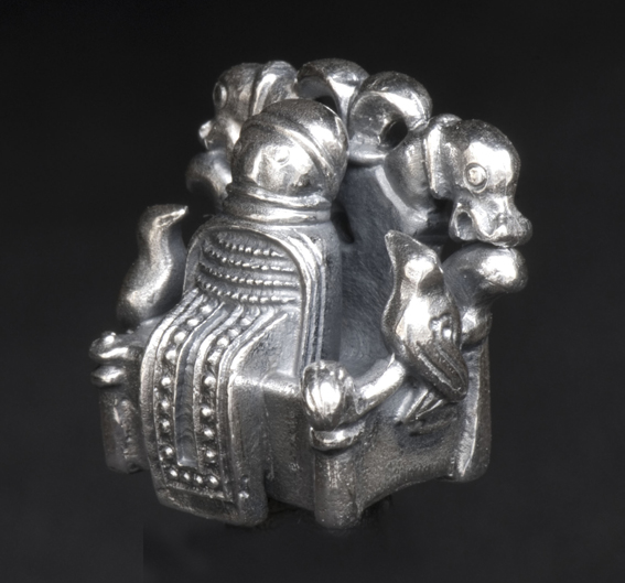 Odin fra Lejre, 900 AD, Roskilde museum. Læs mere: Tom Christensen «Gud, Konge eller ...?»; Arkæologisk Forum nr. 22, maj 2010; archaeology.dk